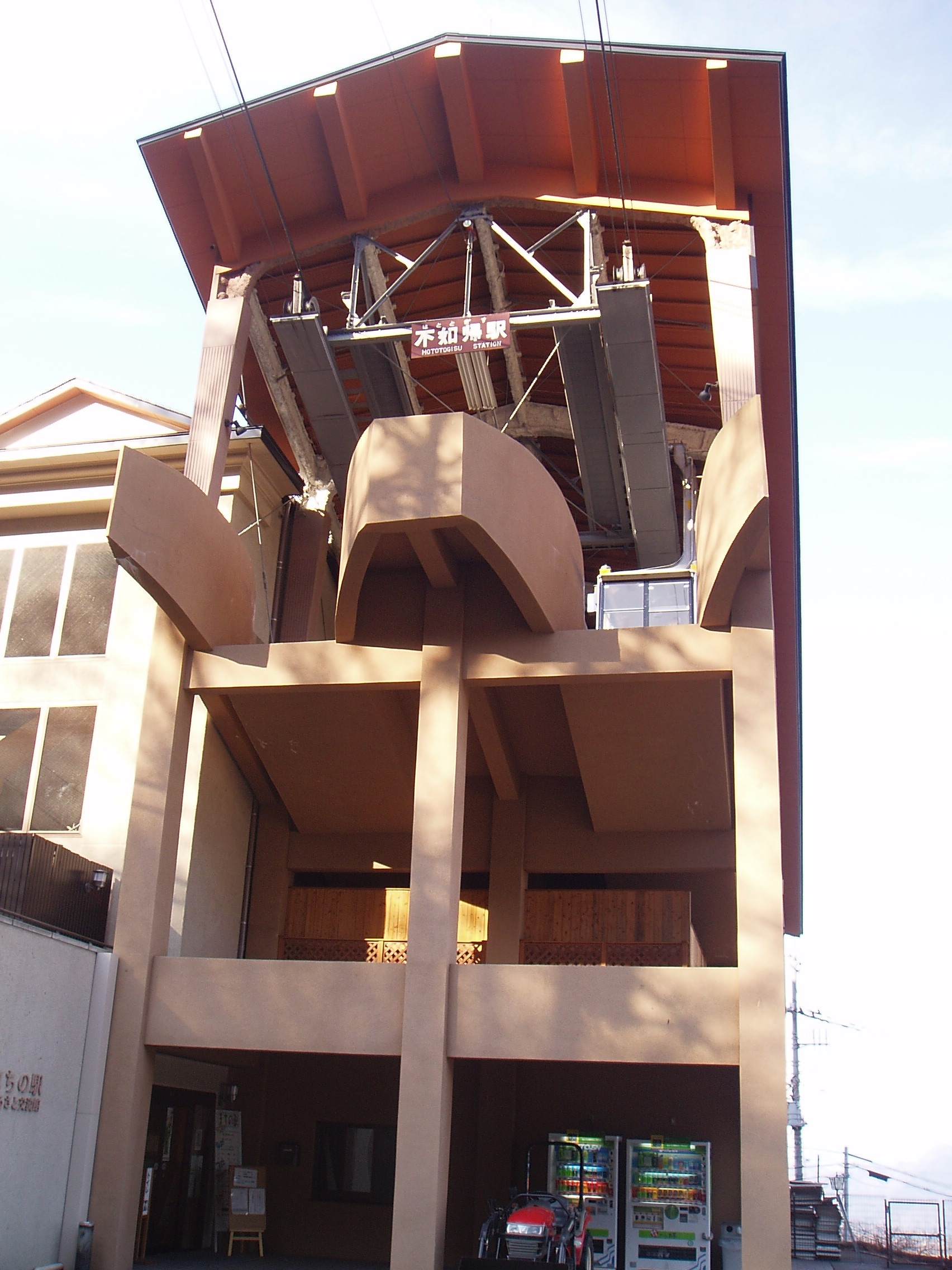 不如帰駅駅舎